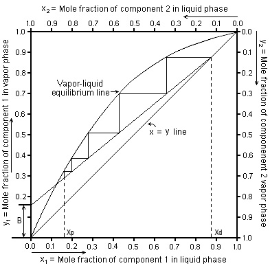 Кривая равновесия пар - жидкость и рабочая линия процесса периодической ректификации, пример Является изменённым файлом Vapor-Liquid Equilibrium Diagram.png, размещённом на Вики складе под свободной лицензией